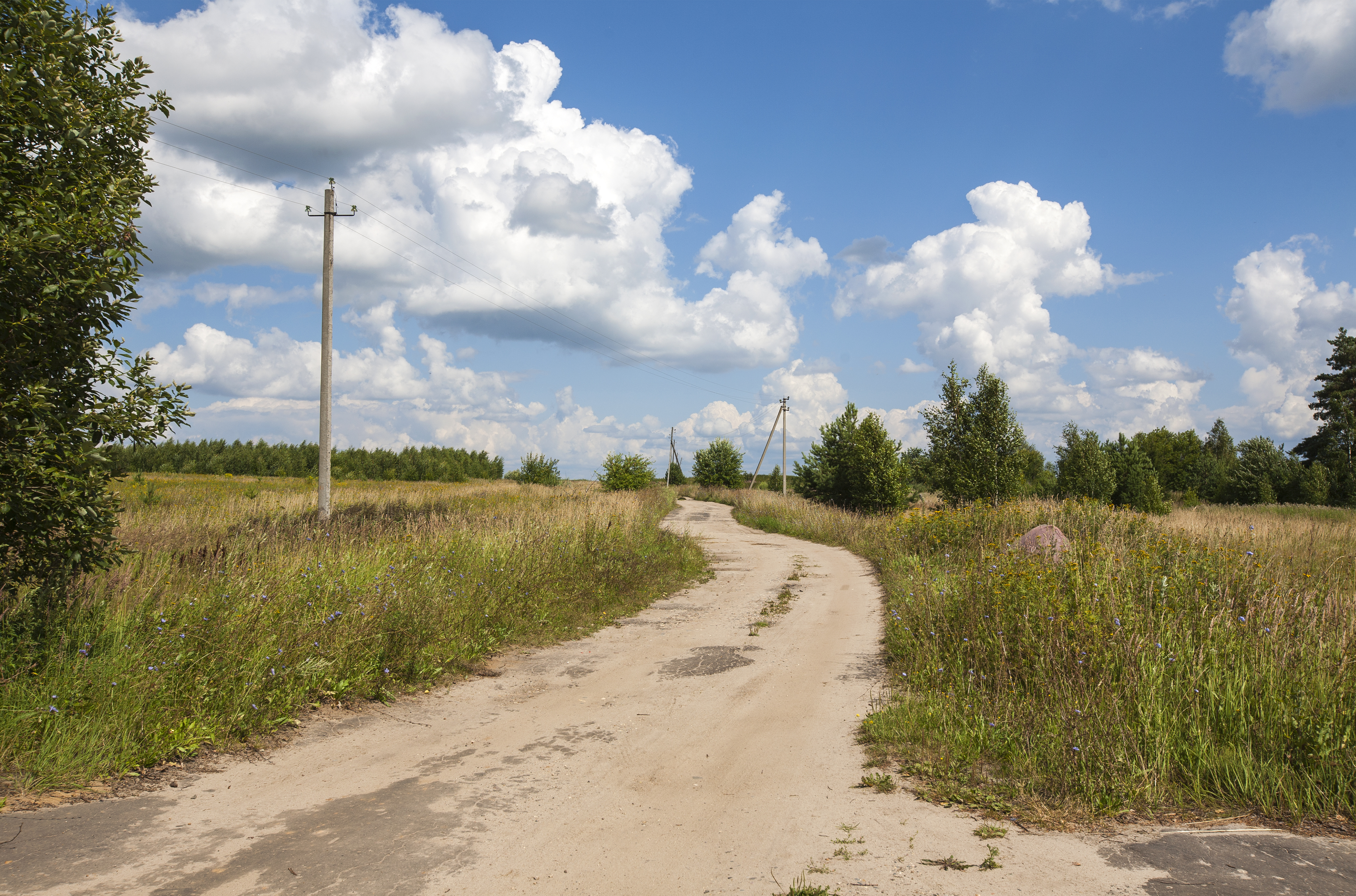 Деревня Умеково Пучежского района Ивановской области и её окрестности.